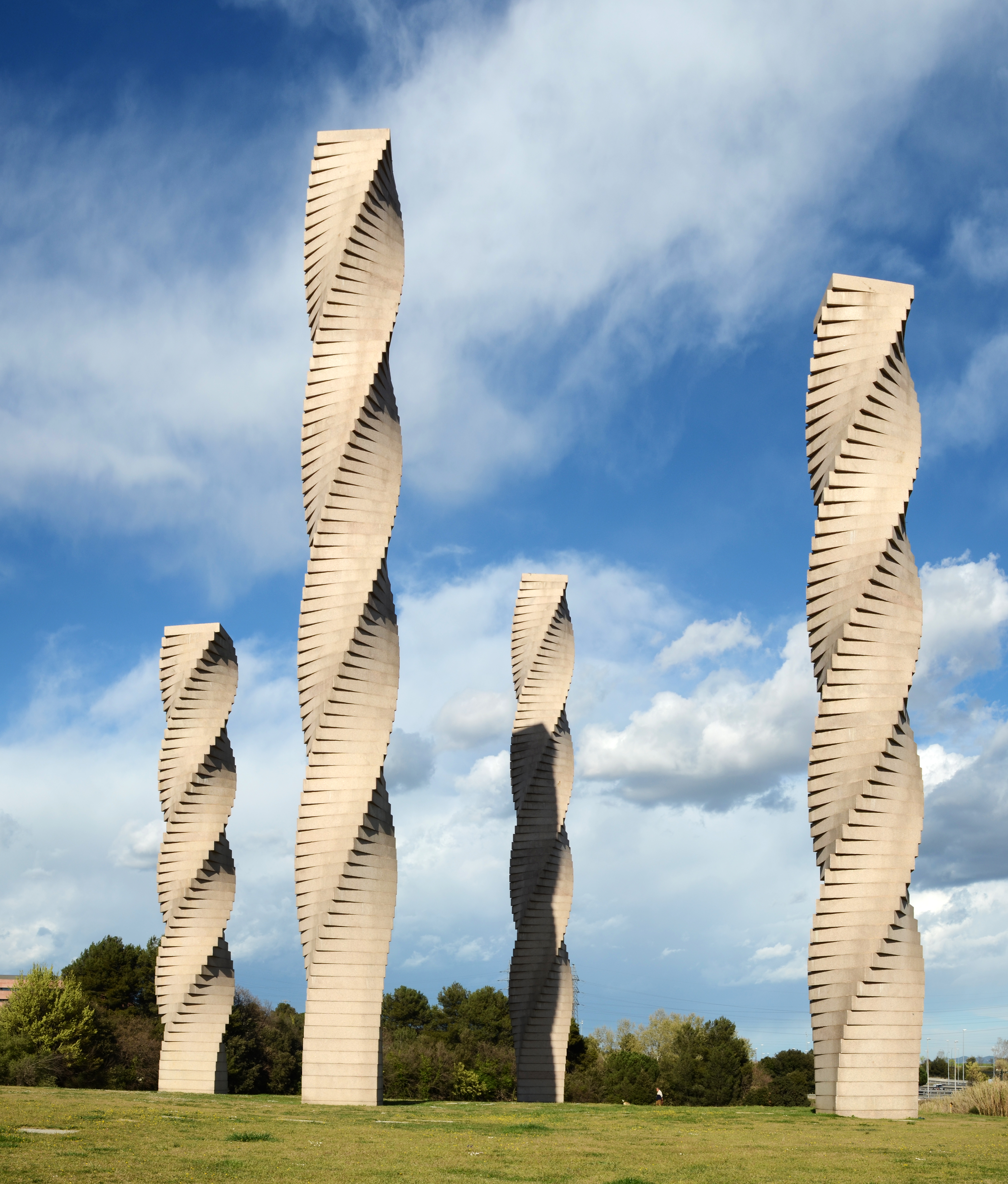 Las cuatro columnas en la UAB